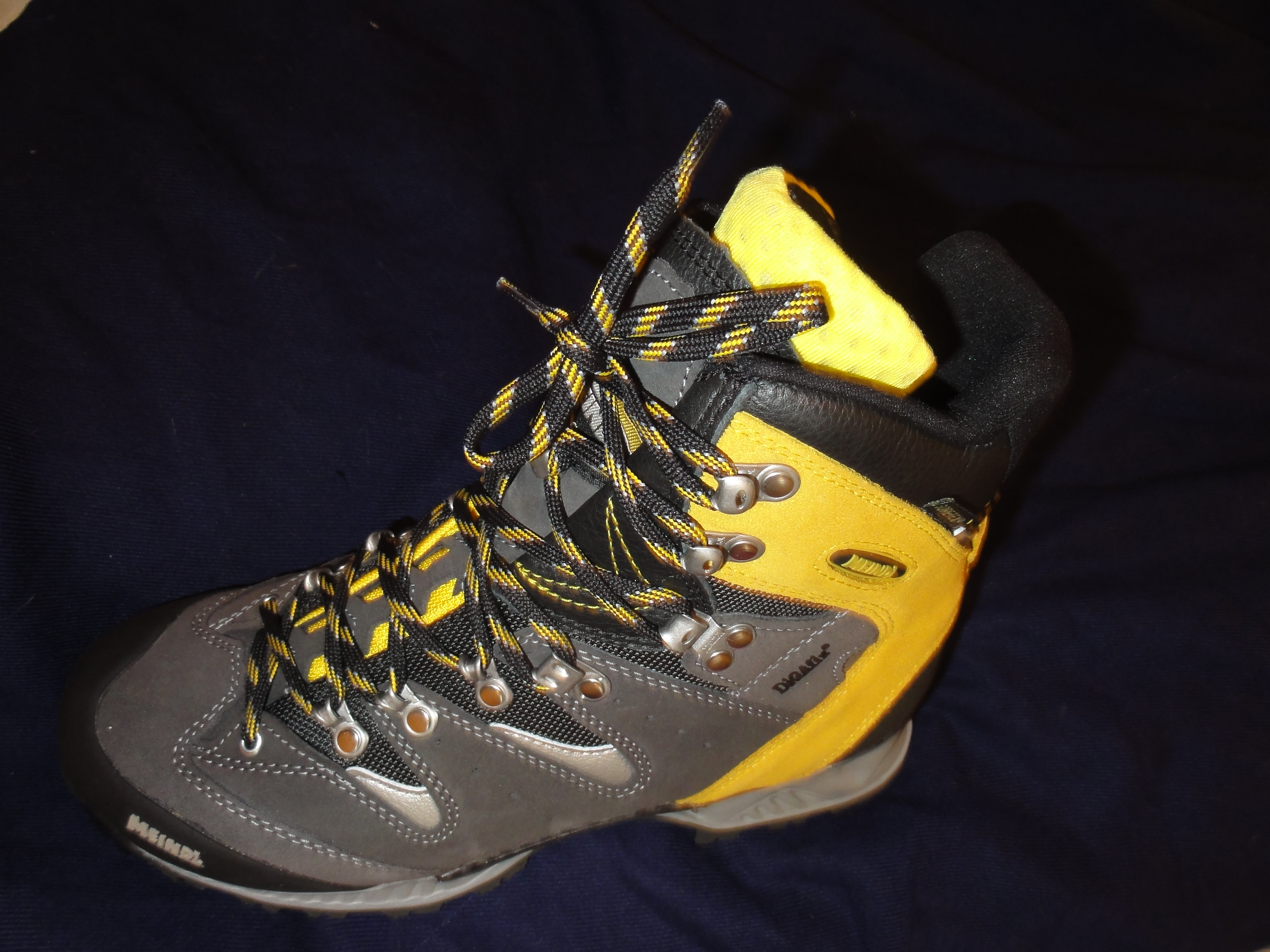 Meindl-Bergstiefel Air Revolution® 2.3 men, Kategorie IV (Meindl-Anwendungsbereich B), geschnürt